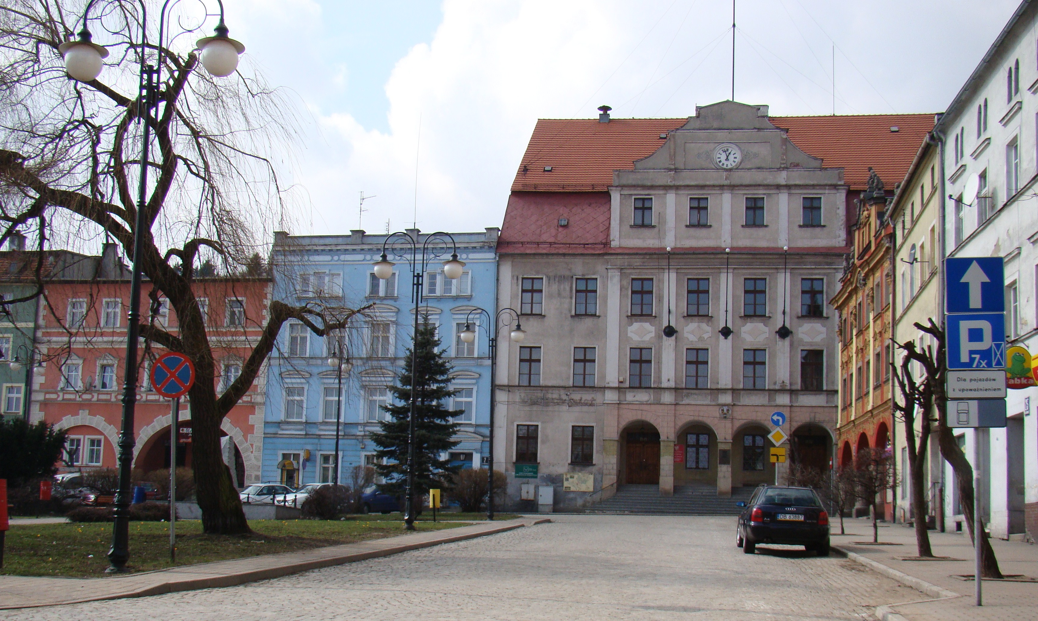 Mieroszów - Plac Niepodległości / Rynek (zabytek nr 624 z 1.09.1959)